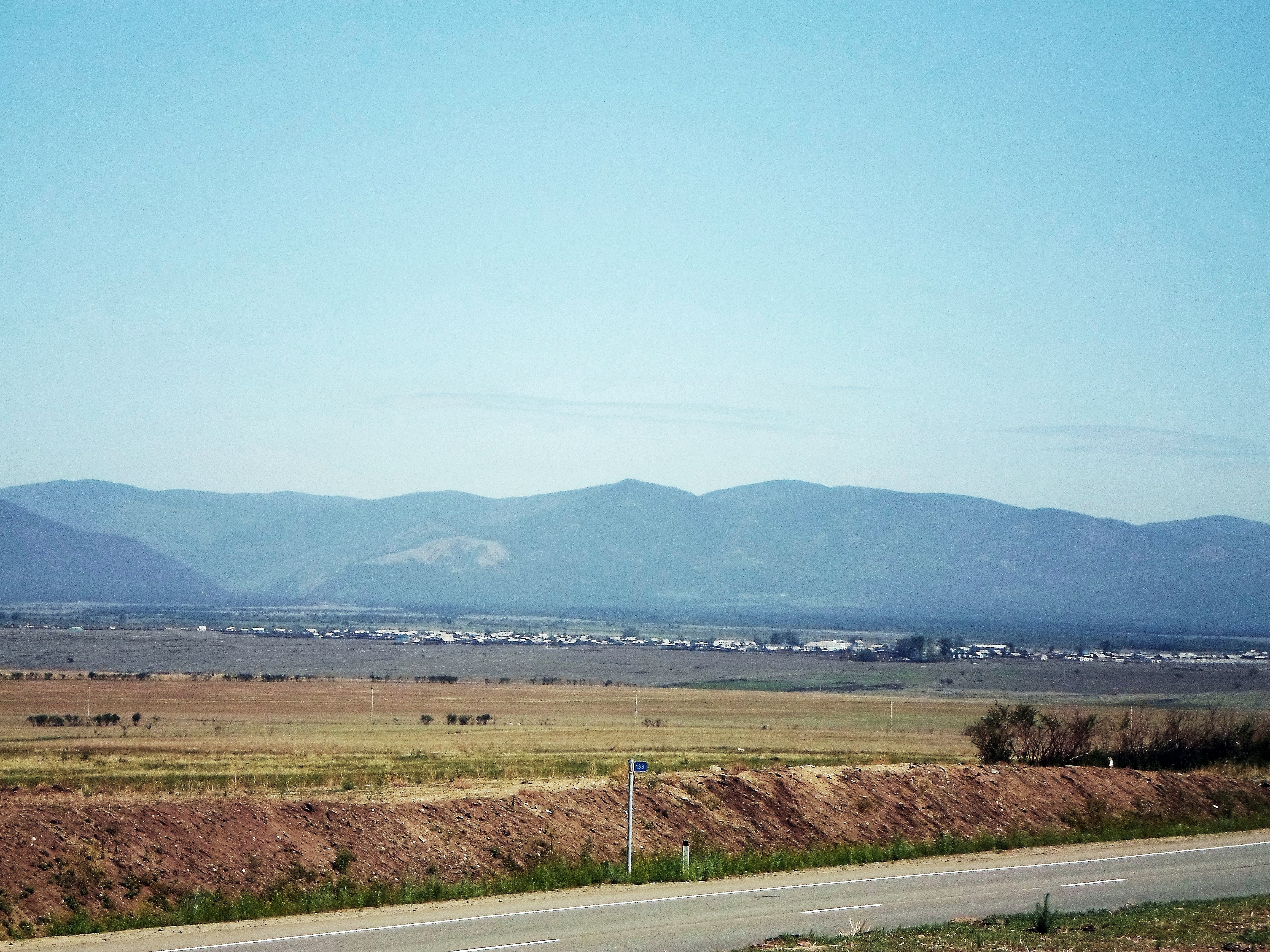 Тохой, Селенгинский район Бурятии. Вдали - Хамар-Дабан. Вид от Кяхтинского тракта близ Загустайского дацана.